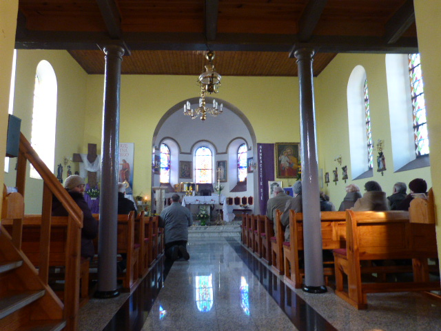 Redło - kościół p.w. Narodzenia św. Jana Chrzciciela, 1859, neoromański